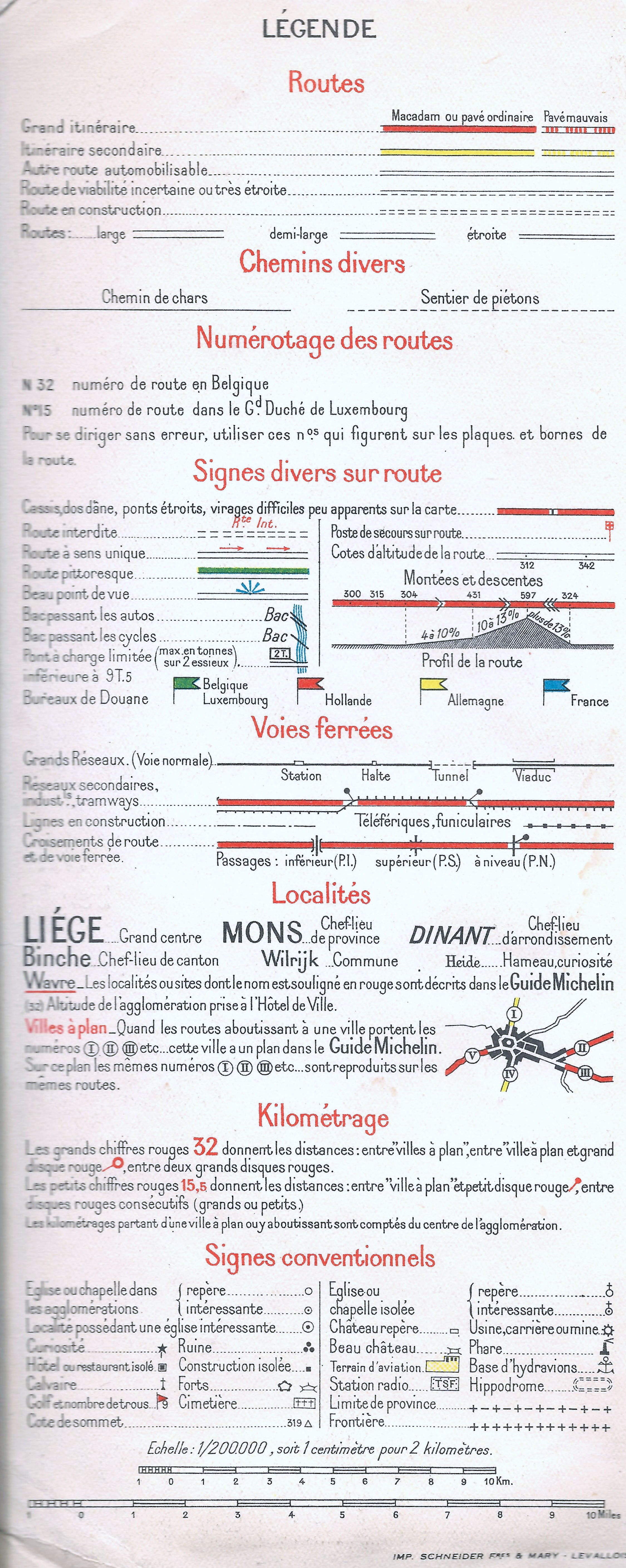 Legenda Michelin kaart nr 4 (Zuid België) uitgegeven in 1940.